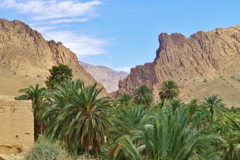 La palmeraie d'El Kantara